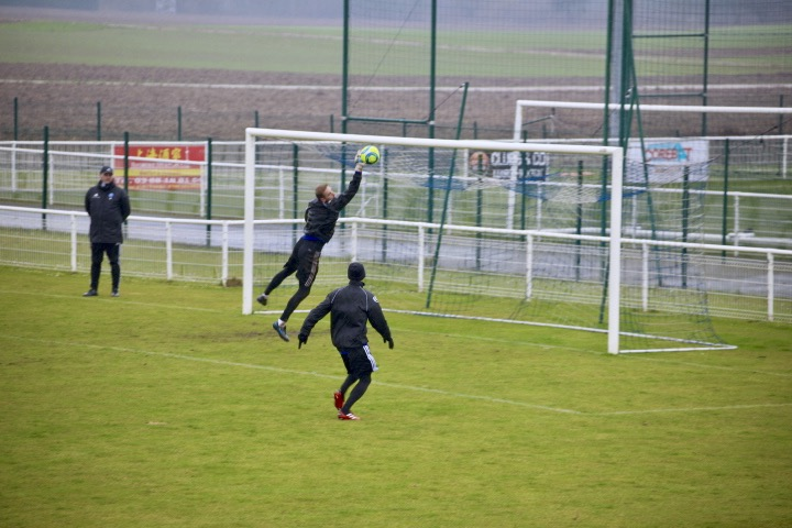 Entrainement RCS - Matz Sels